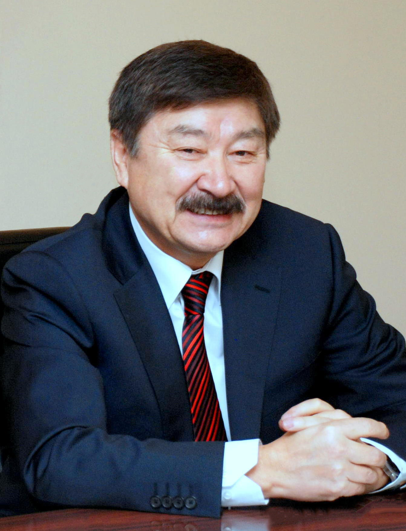 TÜRKSOY Genel Sekreteri - Düsen Kaseinov